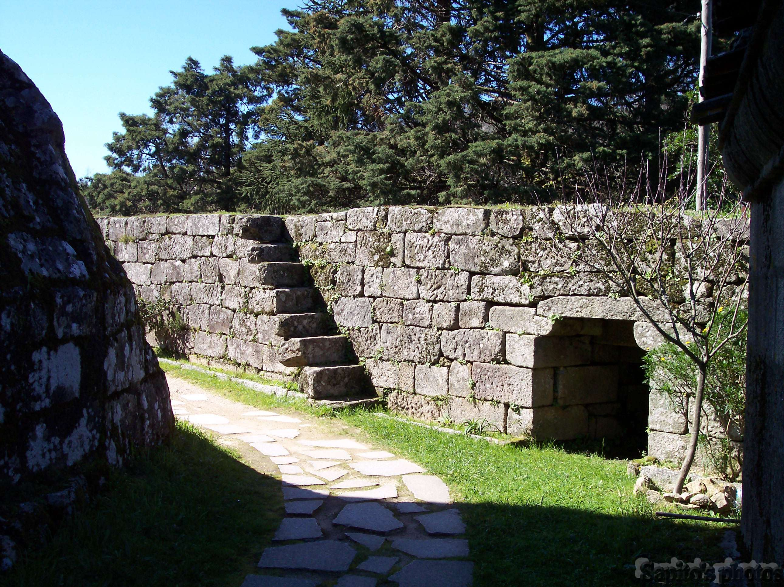 Muralla do castelo de Vilasobroso